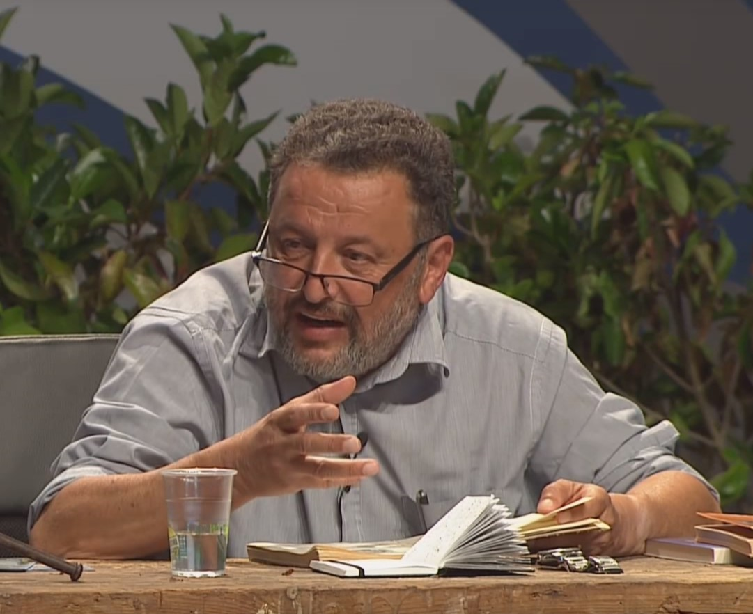 Franco Nembrini al Meeting di Rimini 2017.